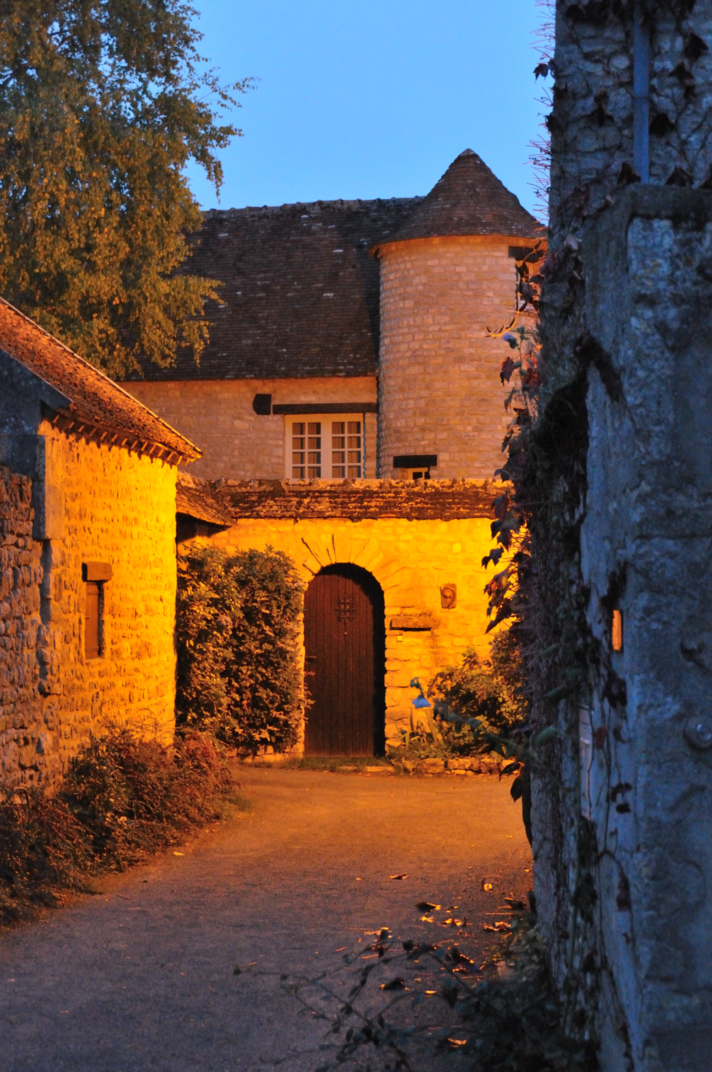 Rue de la Basse-Cour, Yèvre-le-Châtel, Loiret, France